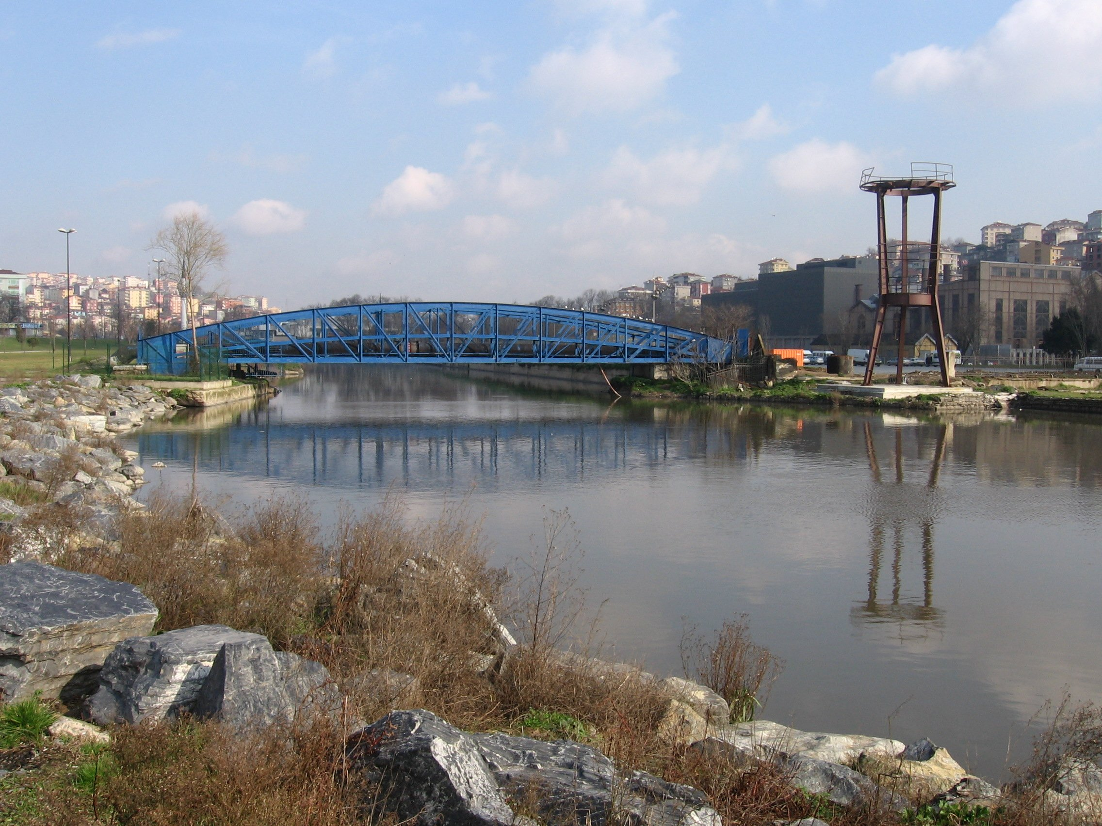 Alibey Deresi